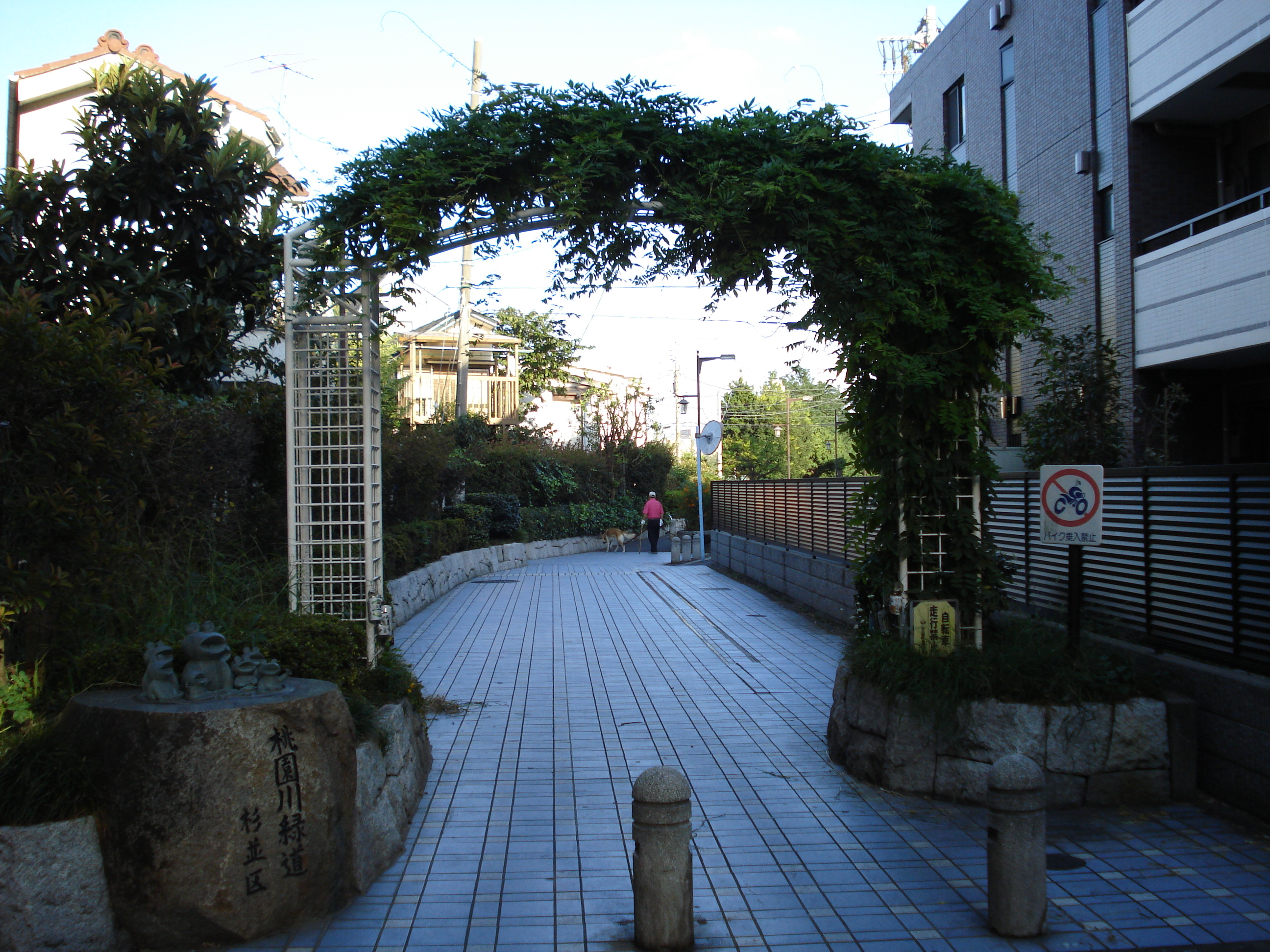 tokyo